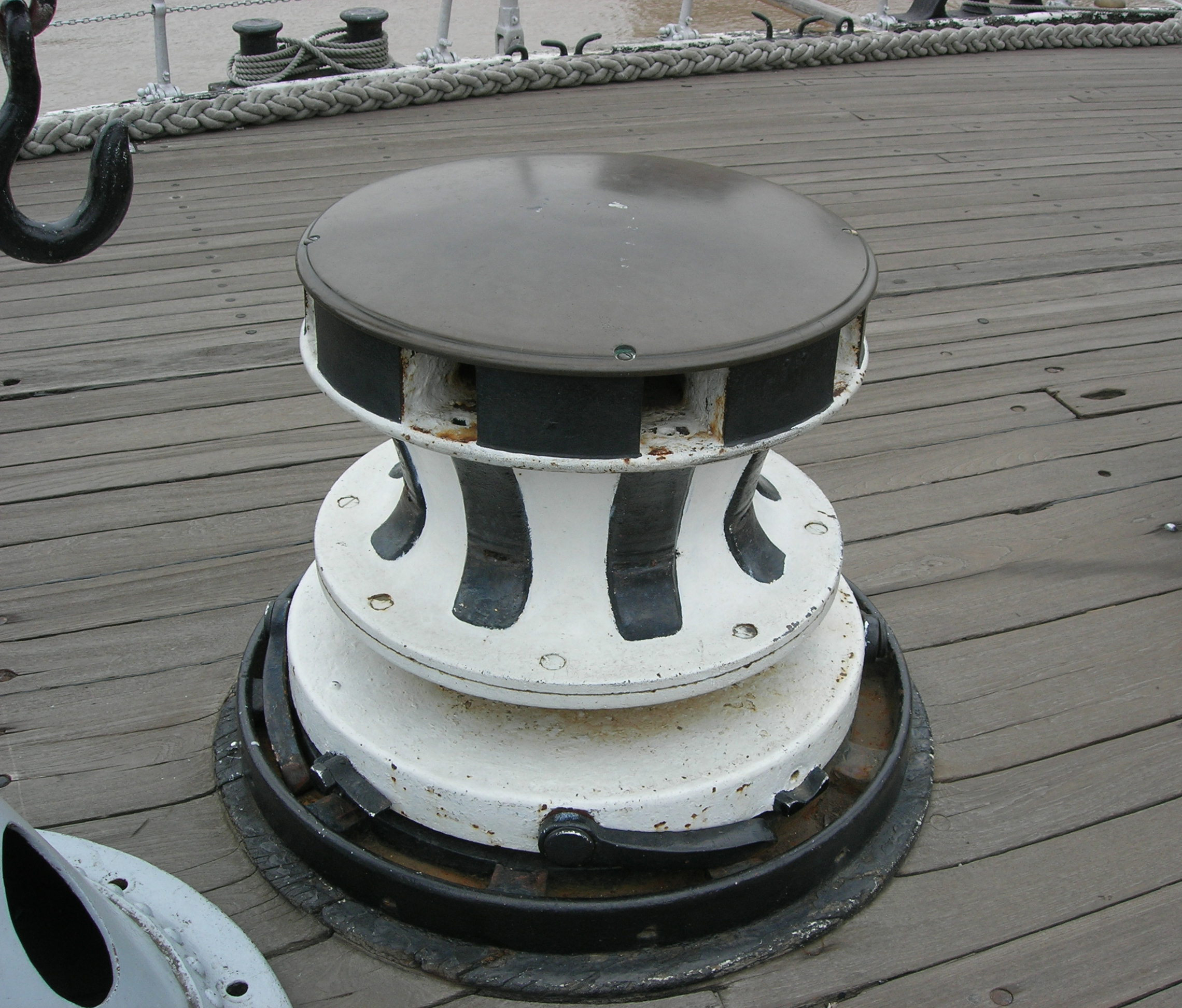 Description = Cabestan de la frégate musée Samiento Source =Photo taken by Remi Jouan Date =Avril 2006 Author =Remi Jouan